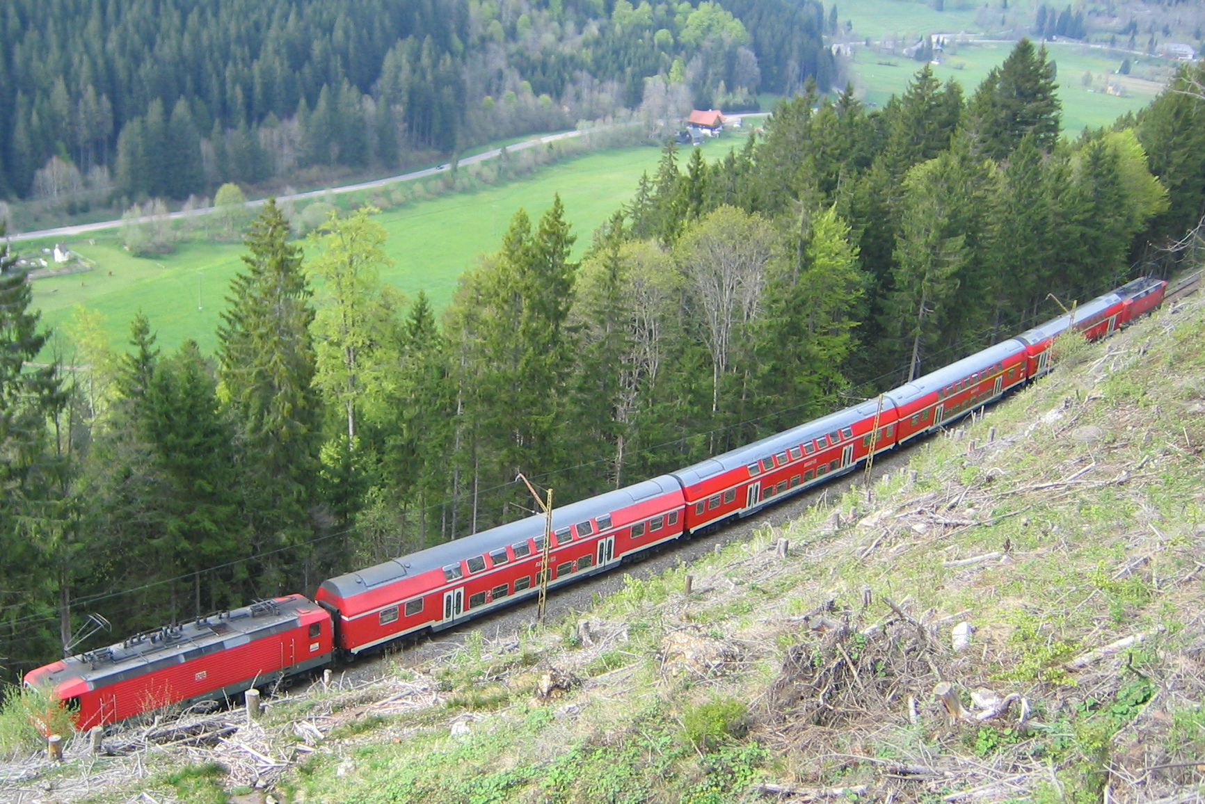 Die Dreiseenbahn während der Anfahrt auf den Bahnhof Bärental